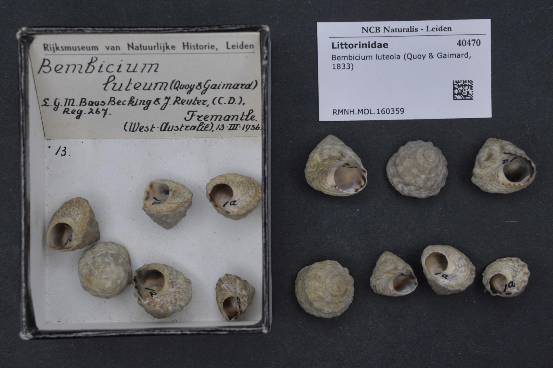 Bembicium luteola (Quoy & Gaimard, 1833)